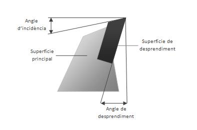 Esquema dels angles d'una eina de tall